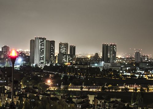 Grattacieli presenti nel quartiere Fieristico della città di Bologna